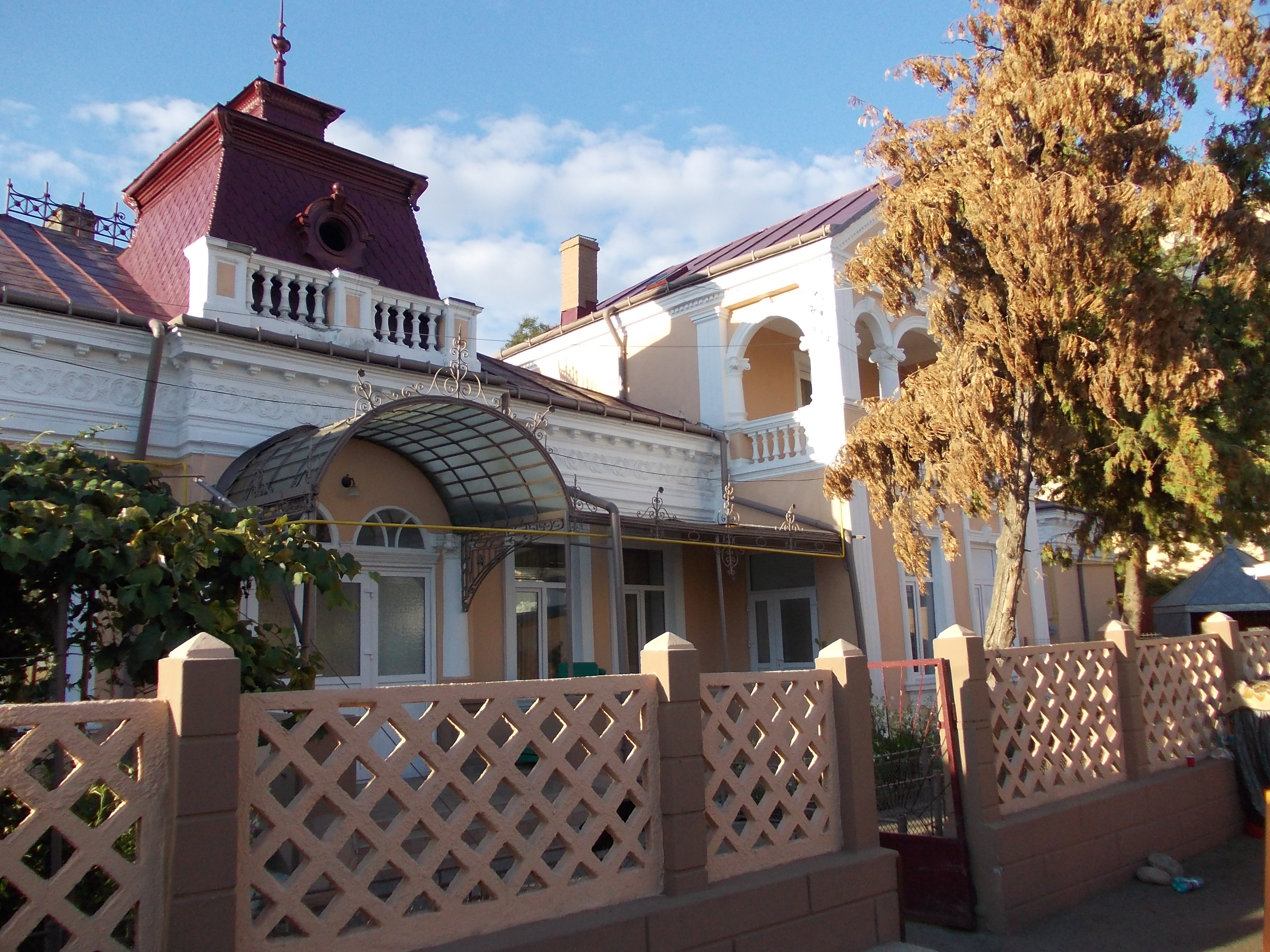 Casa Rollrich, azi Administrația piețelor